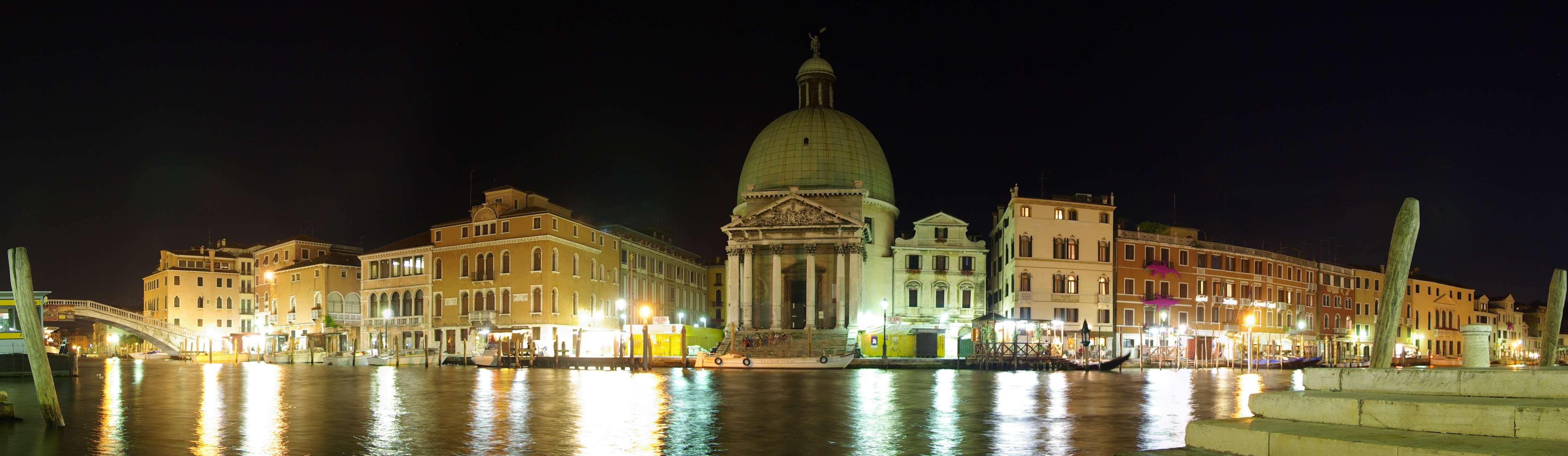 Autore: io, Della Pietra Leonardo Panorama della chiesa di San Simeon Piccolo a Venezia, preso il 24 maggio 2007 con una k10d , obiettivo sigma 17-70. Composizione di 4 immagini realizzata con hugin + enblend, post-processing con gimp. Licenza: GFDL